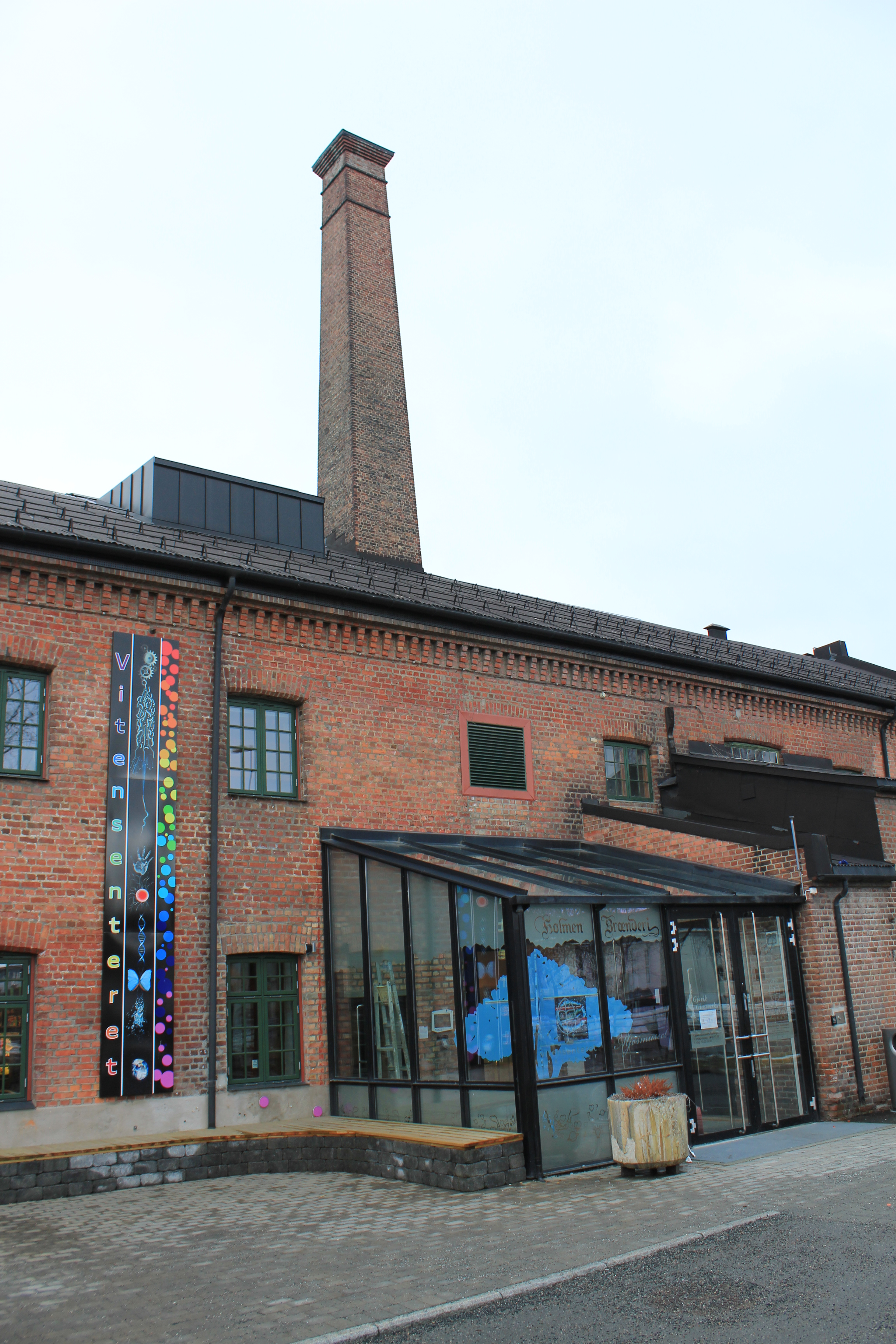 Vitensenteret på Gjøvik.